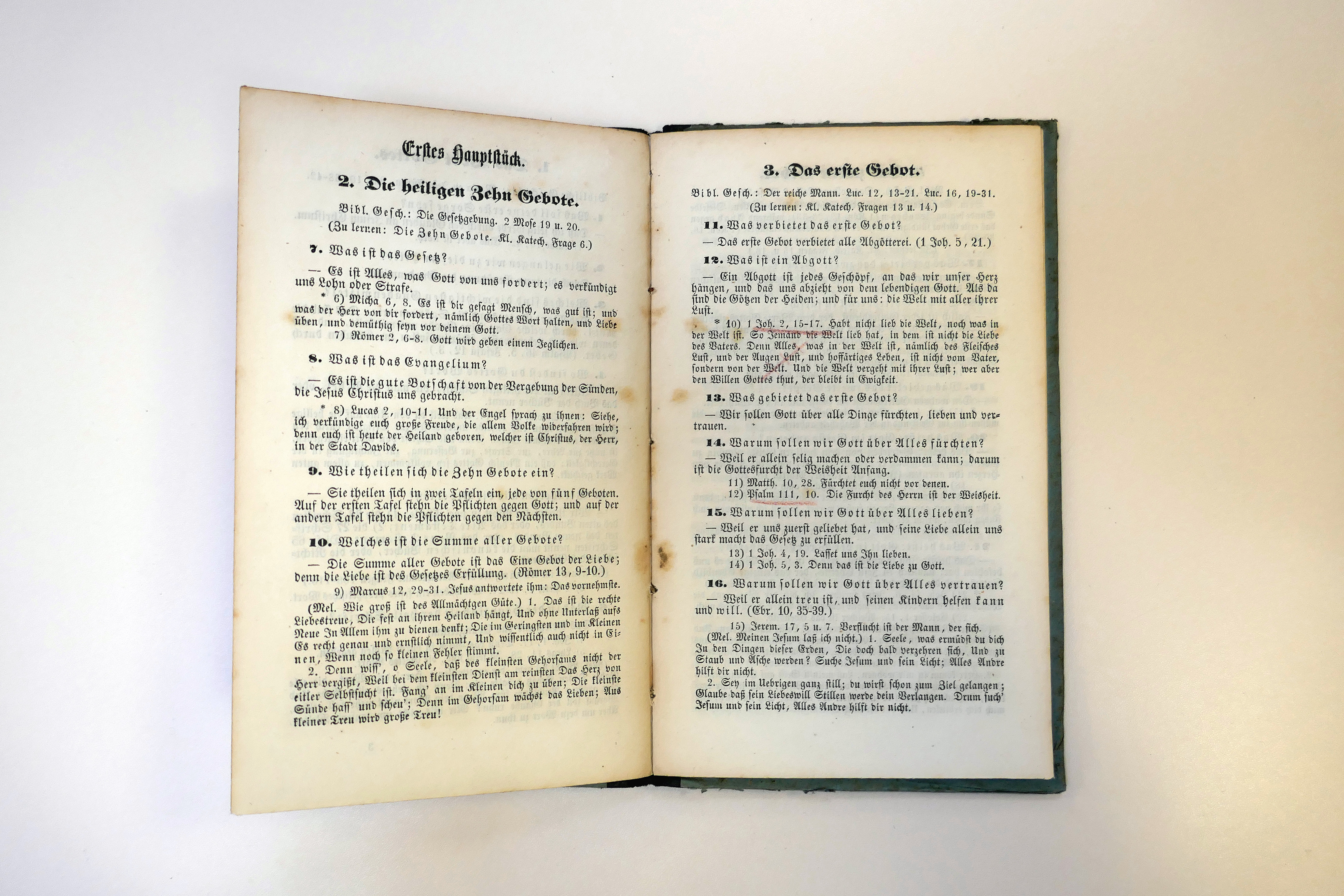 Handbüchlein für Jung und Alt : oder Katechismus der evangel. Heilslehre François-Henri Haerter 2te umgearbeitete Ausgabe als Anhang einen Ueberblick der Kirchengeschichte enthaltend Strassburg, Vve Berger-Levrault, 1862, IV-38 p., 18 cm Médiathèque protestante de Strasbourg. Cote : A Va 0088